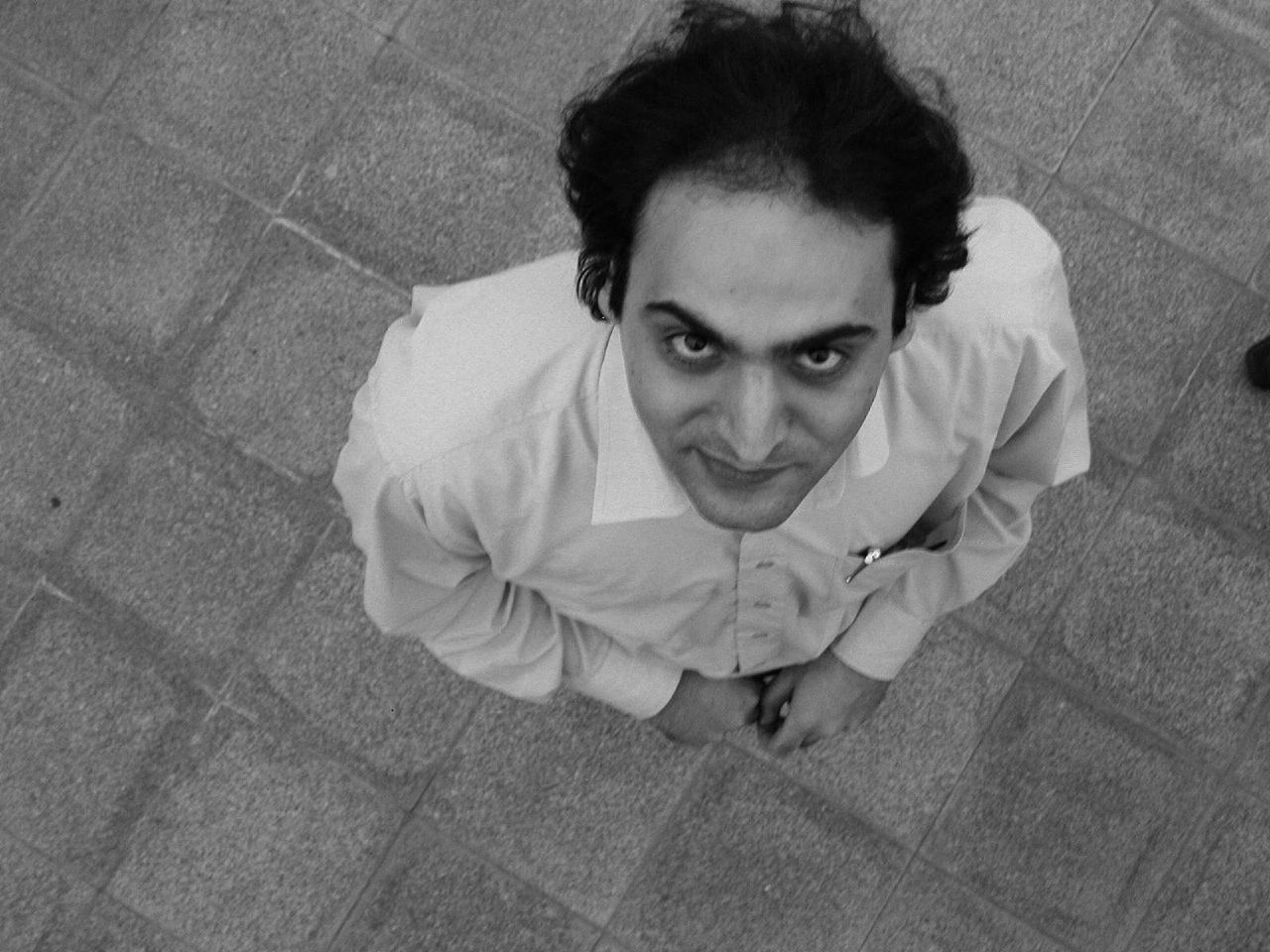 Alireza shirazi